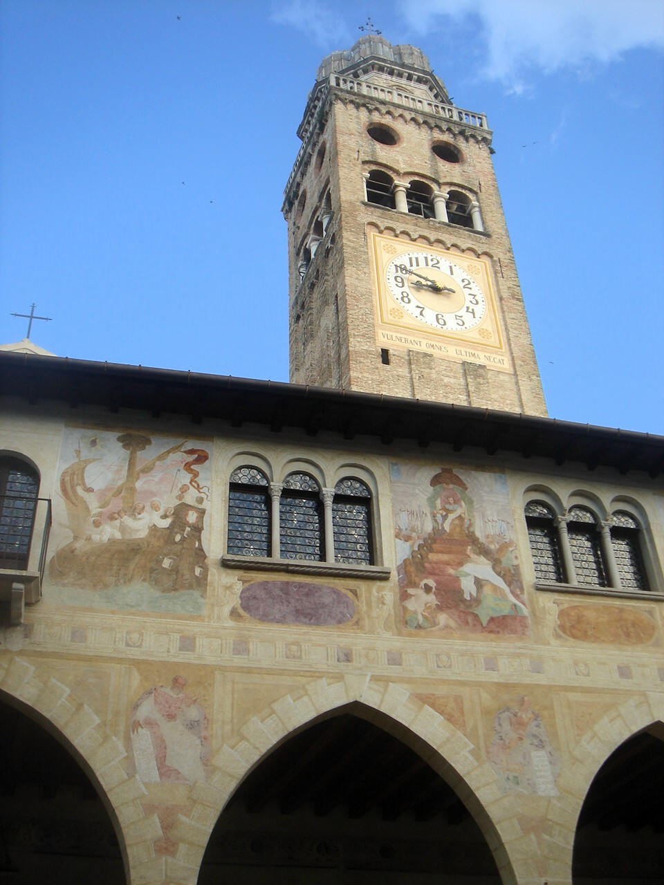 Conegliano, facciata del duomo/sala dei Battuti con affreschi cinquecenteschi